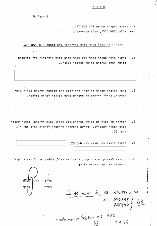 מכתב אלמ מנחם דיגלי לועדת אגרנט - אי הפעלת האמצעים המיוחדים - 6.1.74